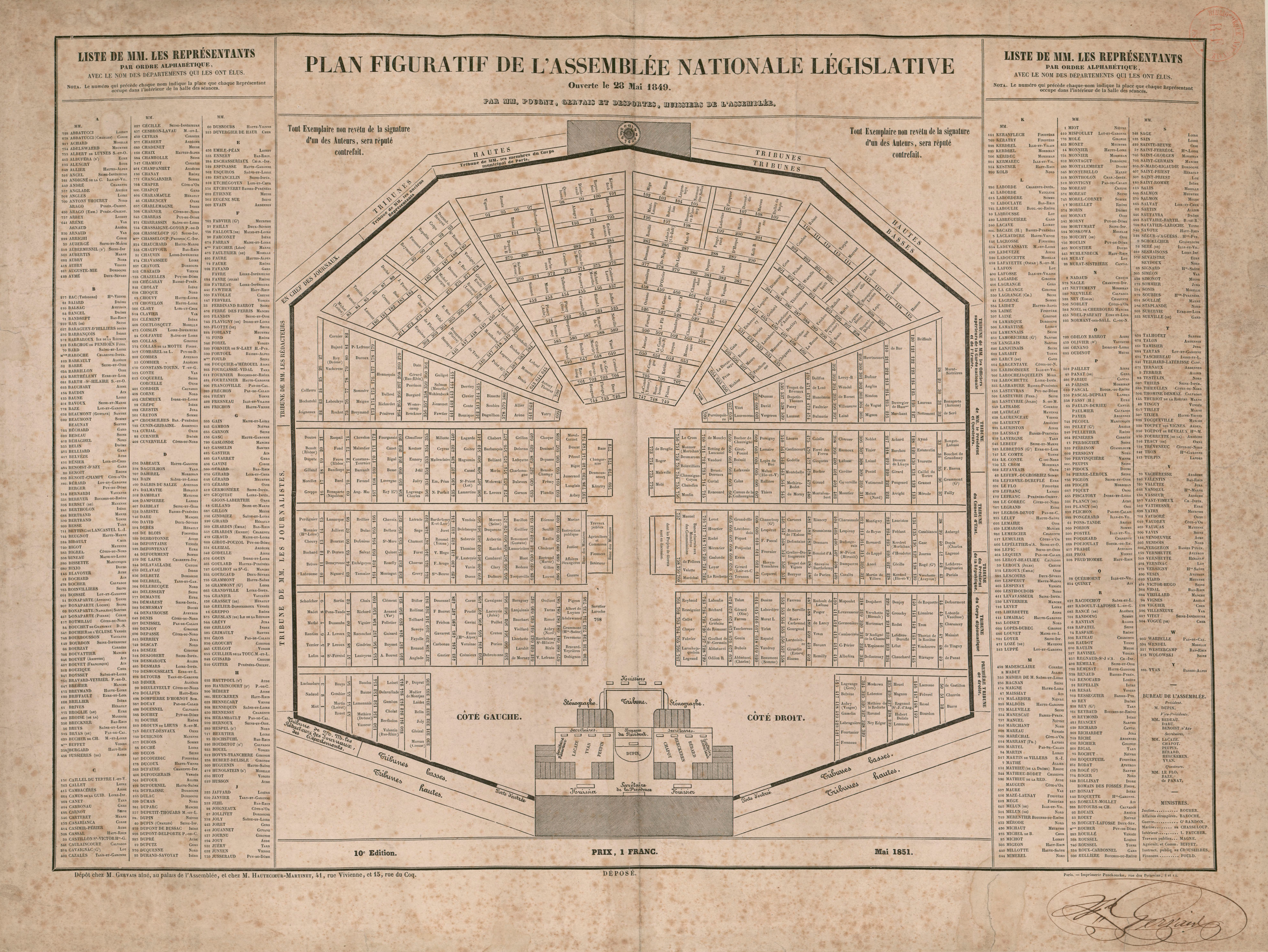 Plan figuratif de l'Assemblée nationale législative ouverte le 28 mai 1849. Par MM. Pougny, Gervais et Desportes, huissiers de l'Assemblée. Éditeur : dépôt chez M. Gervais aîné, au palais de l'Assemblée, et chez M. Hautecoeur-Martinet, 41, rue Vivienne et 15, rue du Coq. Date d'édition : 1851.